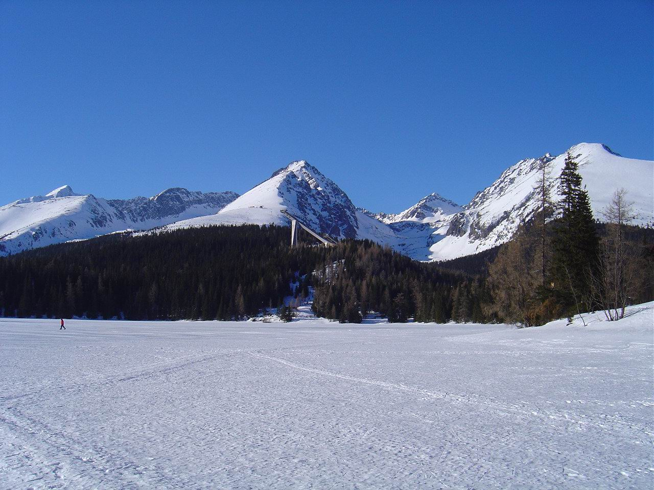 Foto urobil 20.03.2005 Kristián Slimák na Štrbskom Plese. Kategória:Panorámy Kategória:Presunúť_na_Commons